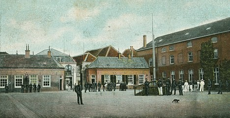 Binnenplaats van het Koloniaal Werfdepot aan de Smeetpoortstraat 37 te Harderwijk, genaamd de Oranje Nassau Kazerne.